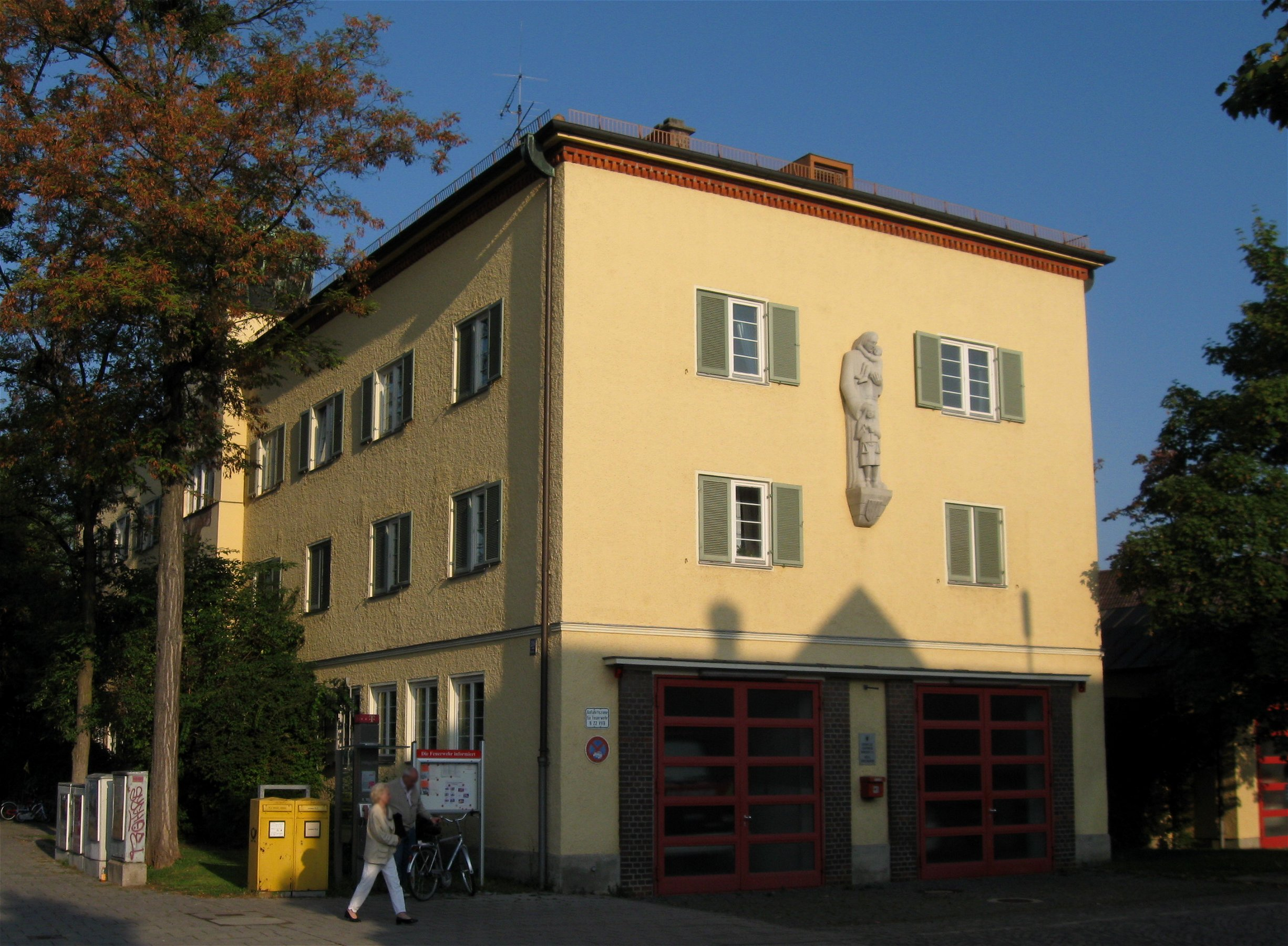 Würmtalstraße 126; Ehem. Rathaus Großhadern, 1930-31 von Ludwig Zwingmann, Versuch einer Verbindung von sachlichem und traditionellem Bauen.